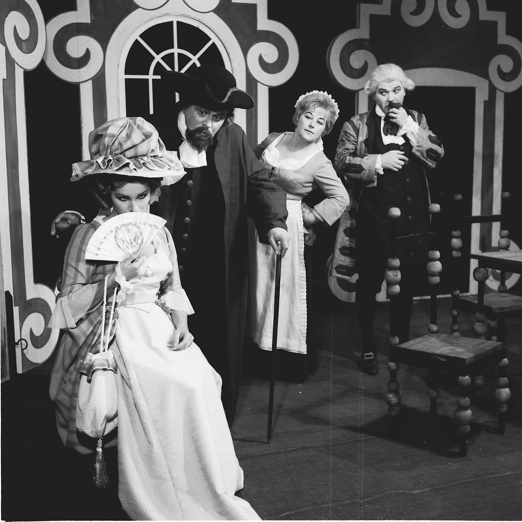 Carlo Goldoni, Tast po sili, Goriško gledališče. Na fotografiji: Teja Glažar, Ernest Zega, Berta Ukmar, Stane Leban.